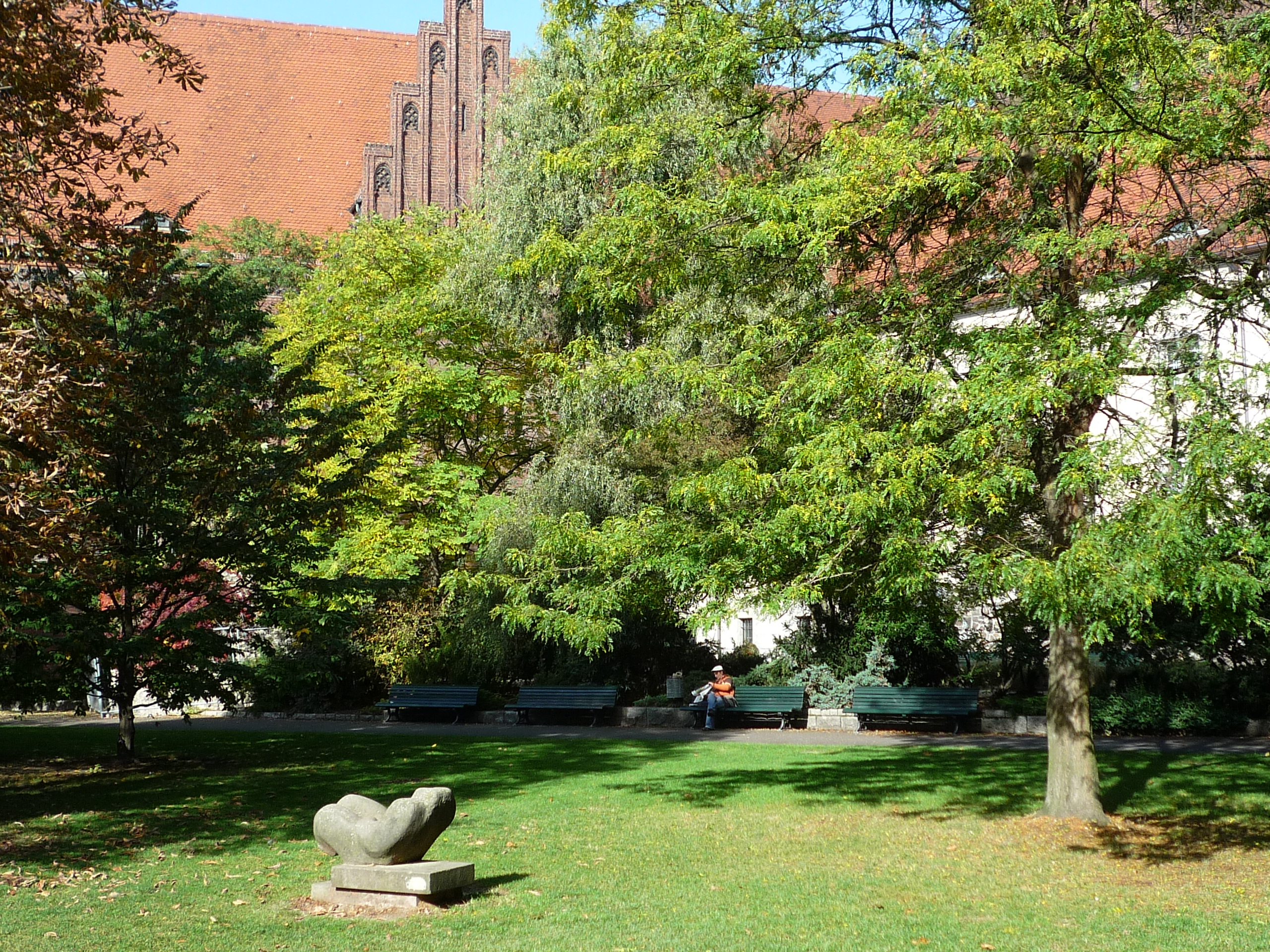 Der Köllnische Park im Berliner Stadtbezirk Mitte. Im Hintergrund das Märkische Museum.